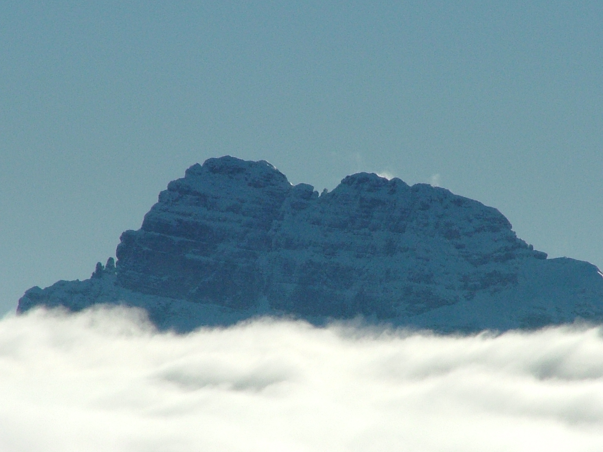 Il Sass de Mura fra le nuvole in inverno.